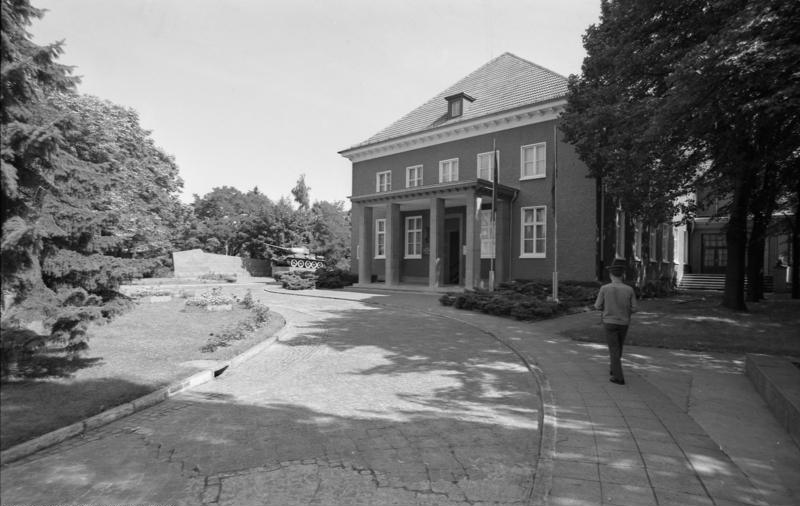 22.7.1991 Berlin-Karlshorst, am sowjetischen Museum der bedingungslosen Kapitulation des Faschistischen Deutschland